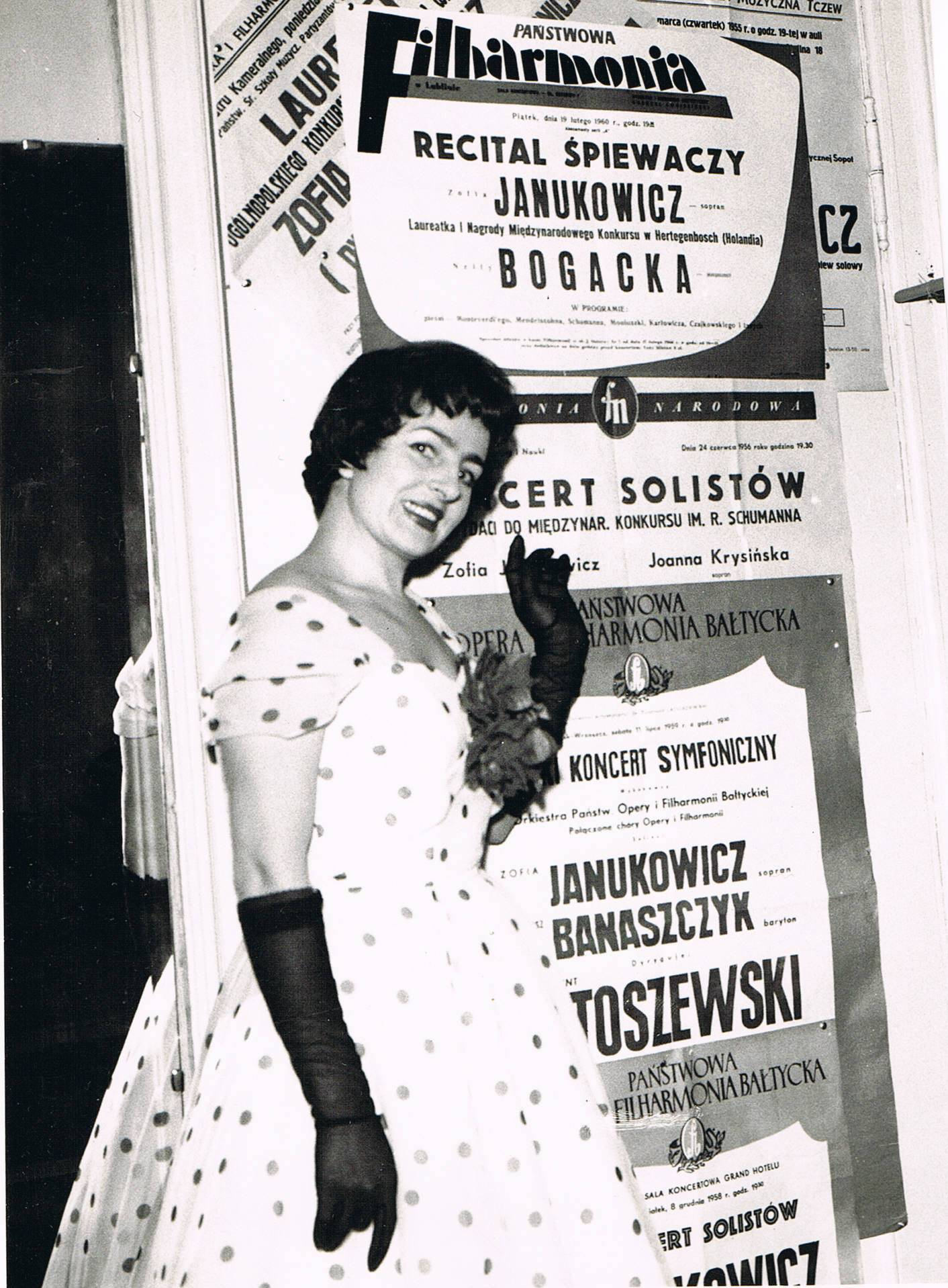 Zofia Janukowicz-Pobłocka - Polish opera vocalist